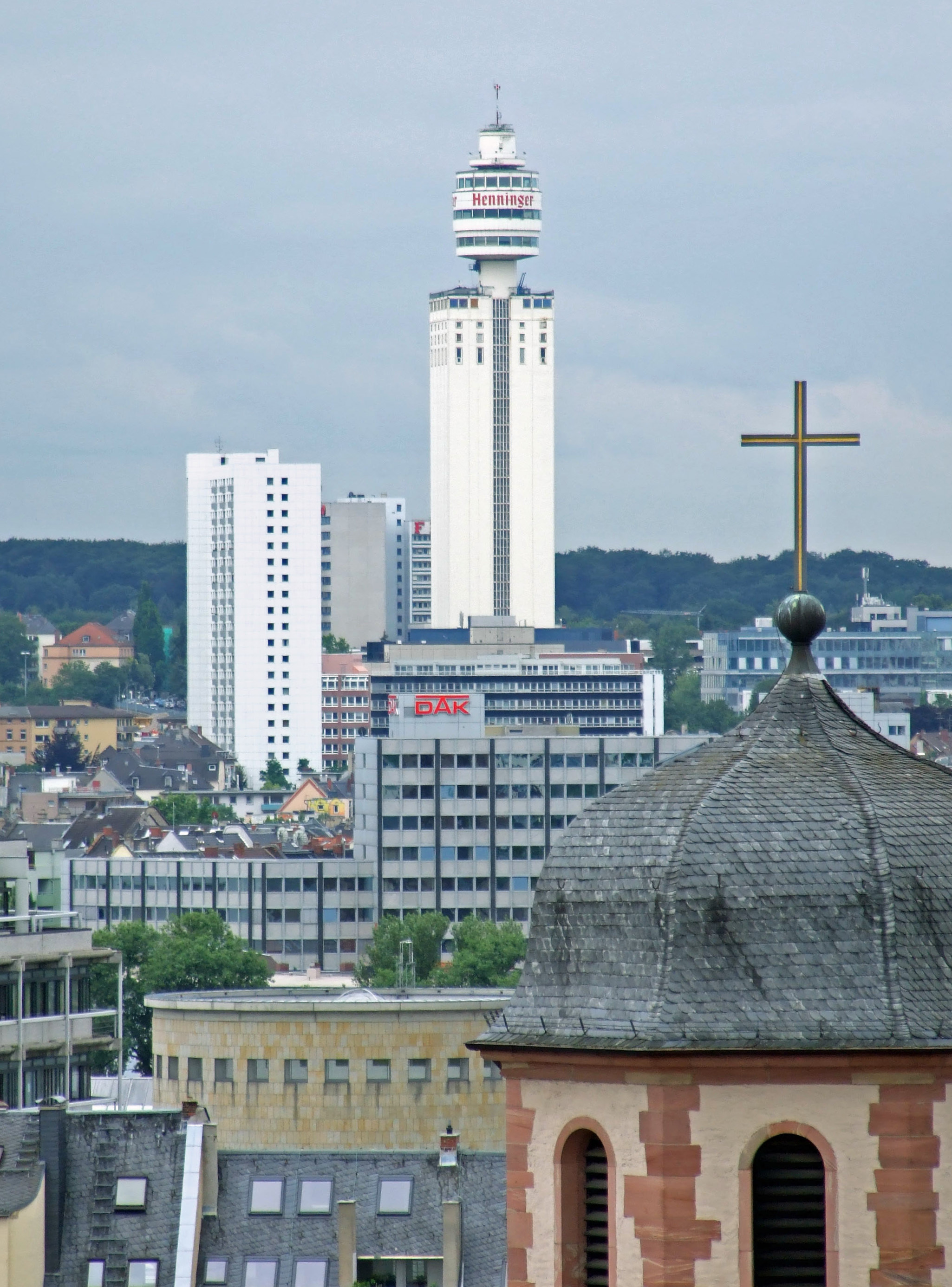 Henninger-Turm von der Zeilgalerie gesehen